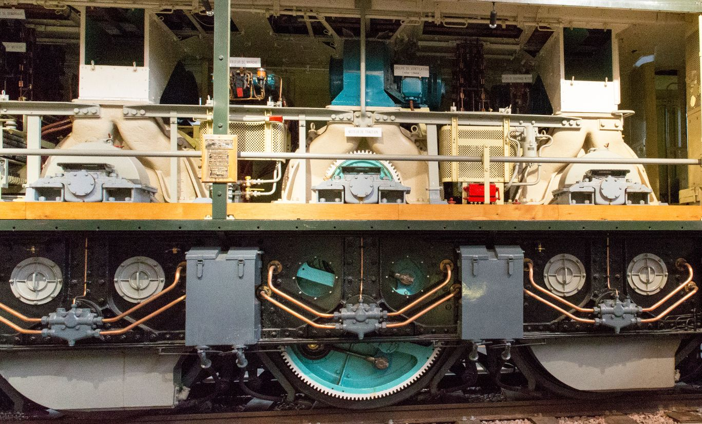 Vue des équipements de traction de la 2D2 5516 écorchée à la Cité du train.